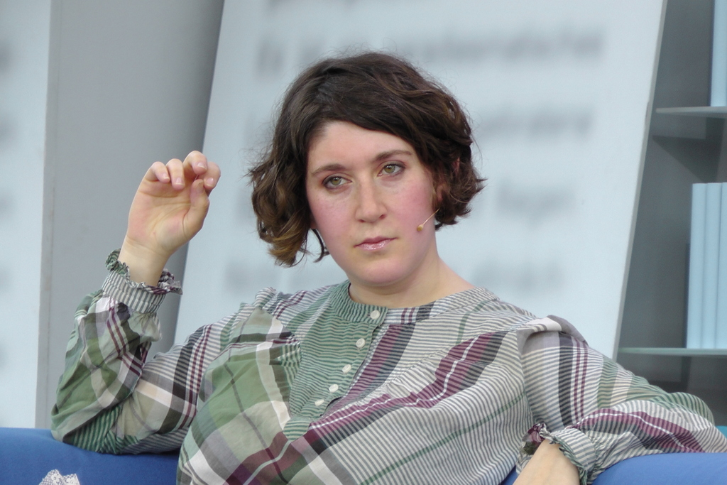 Lena Gorelik auf der Leipziger Buchmesse 2012